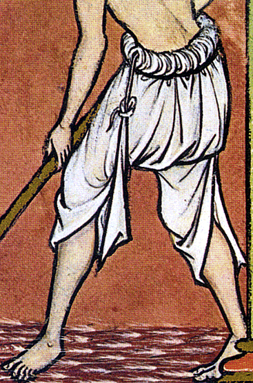 Длинные брэ. Миниатюра из Библии Моргана. Folio 18r. Pierpont Morgan Library, New York, Ms M. 638. 1240-е гг.